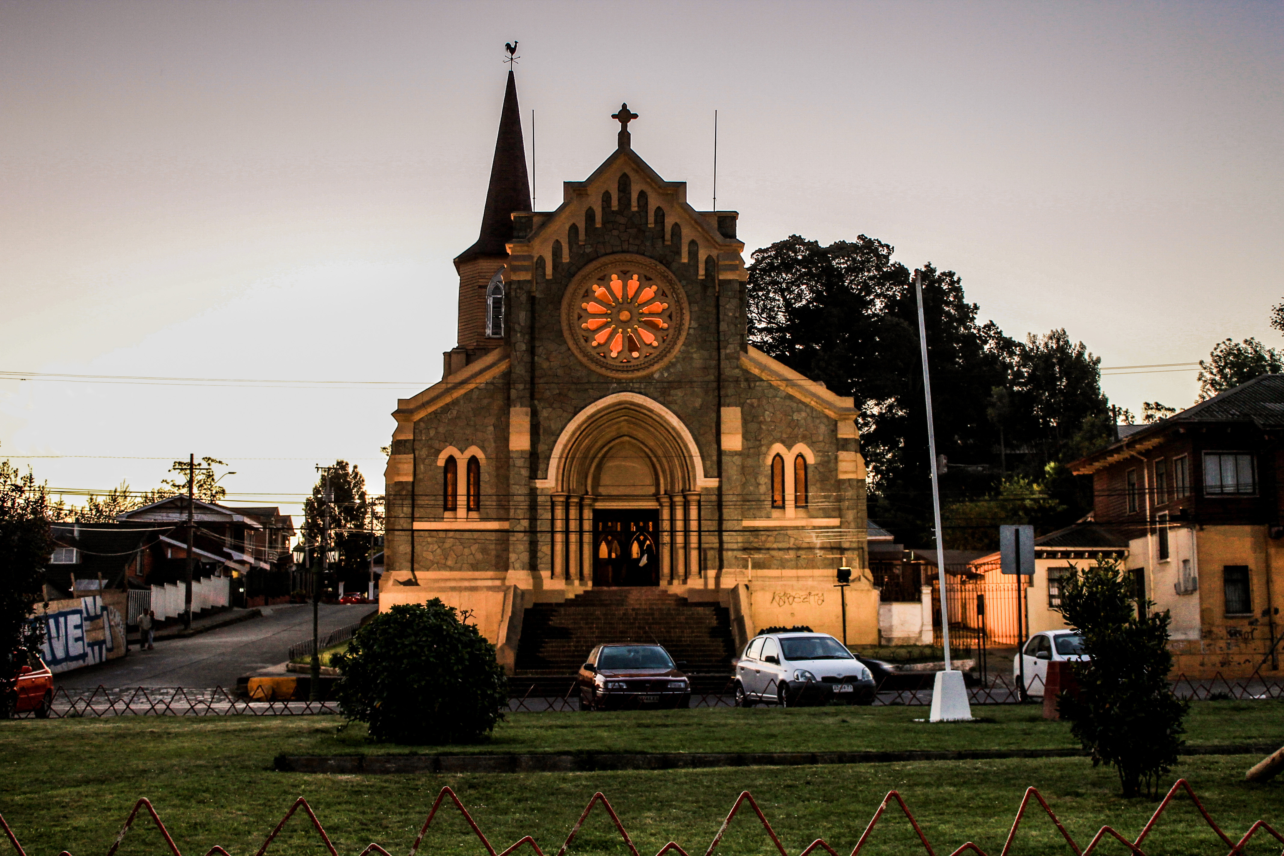 Fotografías Tomadas